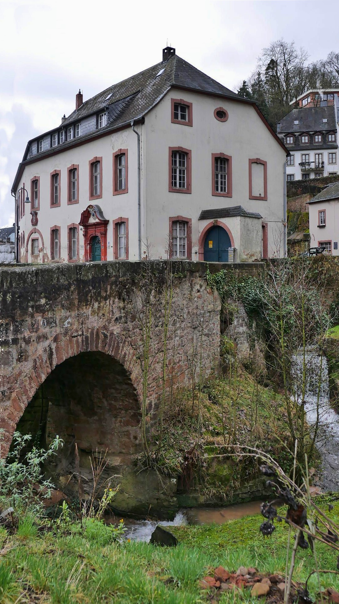 Trier-Pallien: Brücke über den Sirzenicher Bach und ehemaliger Martinerhof